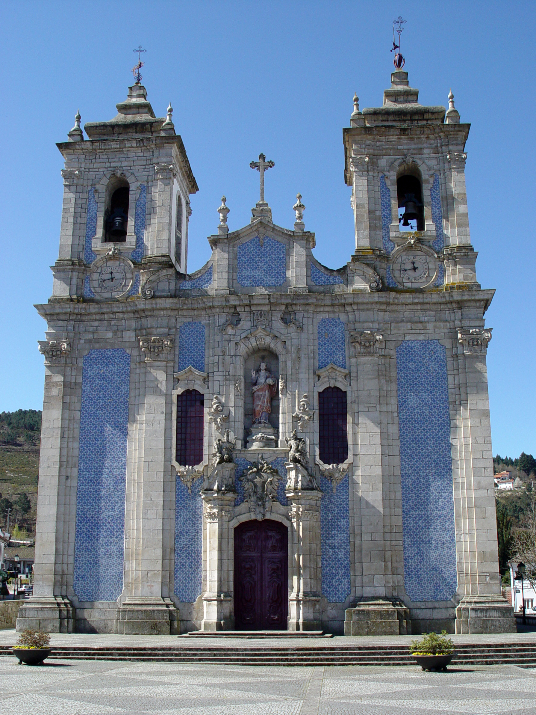 Igreja Matriz de Ribeira de Pena / Igreja de São Salvador This file was uploaded for Wiki Loves Monuments in Portugal with the unique identifier 97012159.